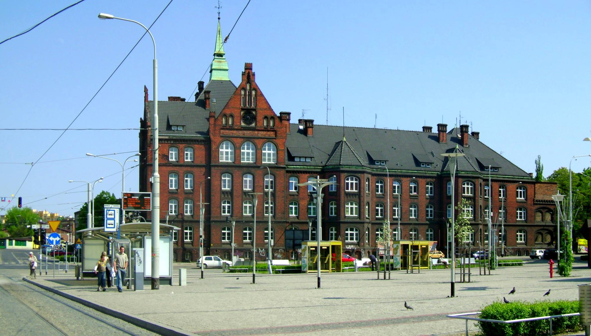 Autorzy projektu: Richard Plüddemann i Karl Klimm. Z założenia część planowanej lecz niezrealizowanej rozbudowy przytułku fundacji rentiera Johanna Heinricha Theodora Classena. Zbudowany w miejscu starego ośrodka z 1852 roku. Koszt budowy 281300 marek. Koszta poniosło miasto.